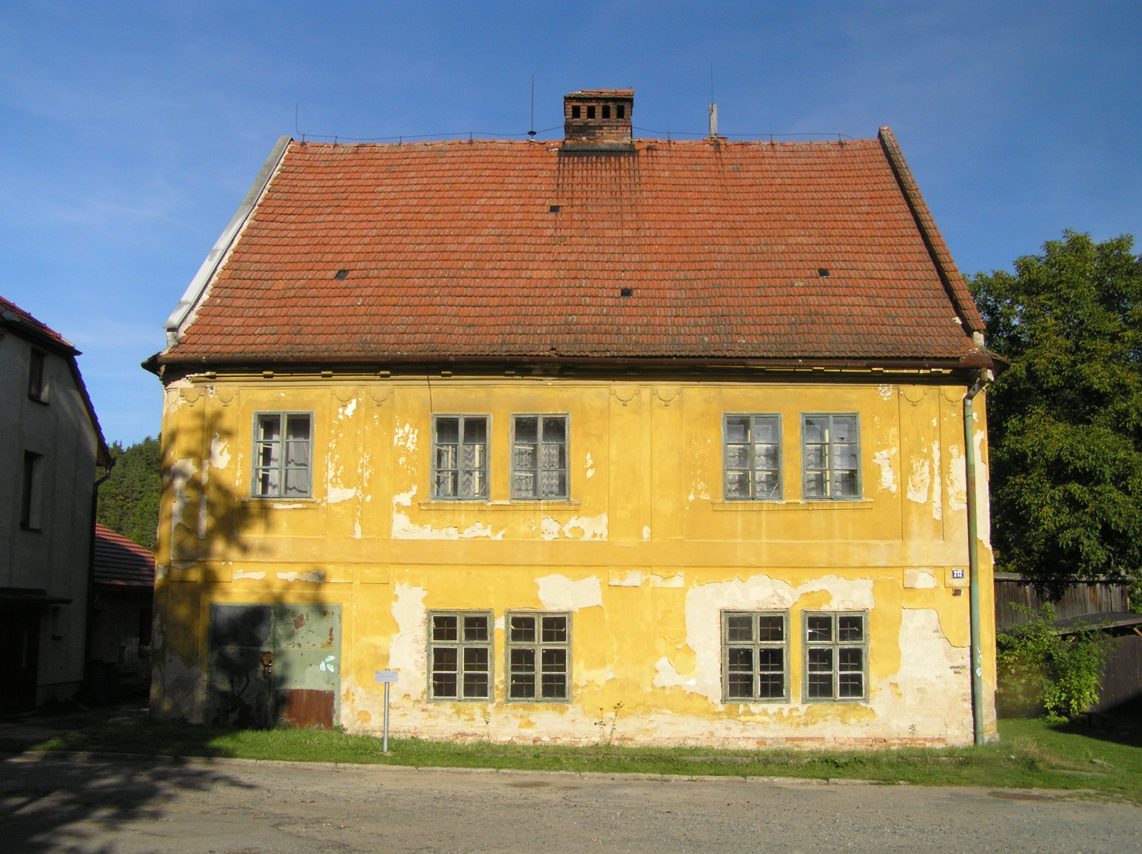 Bývalá židovská škola v Lomnici (okres Brno-venkov)